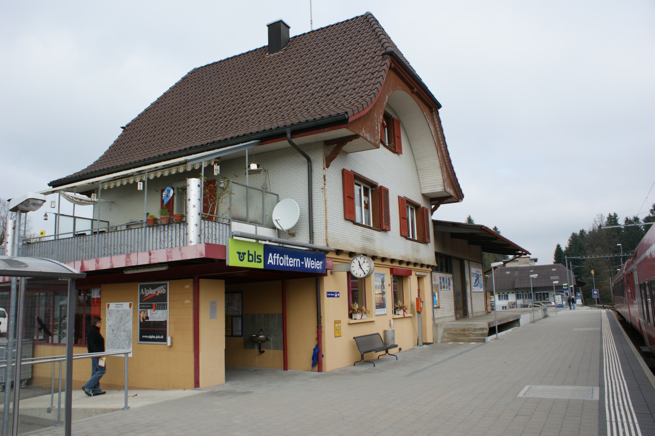 Bahnhof Affoltern-Weier im letzten Betriebsjahr der S4, ab Dezember 2009 fuhren hier nur noch Busse